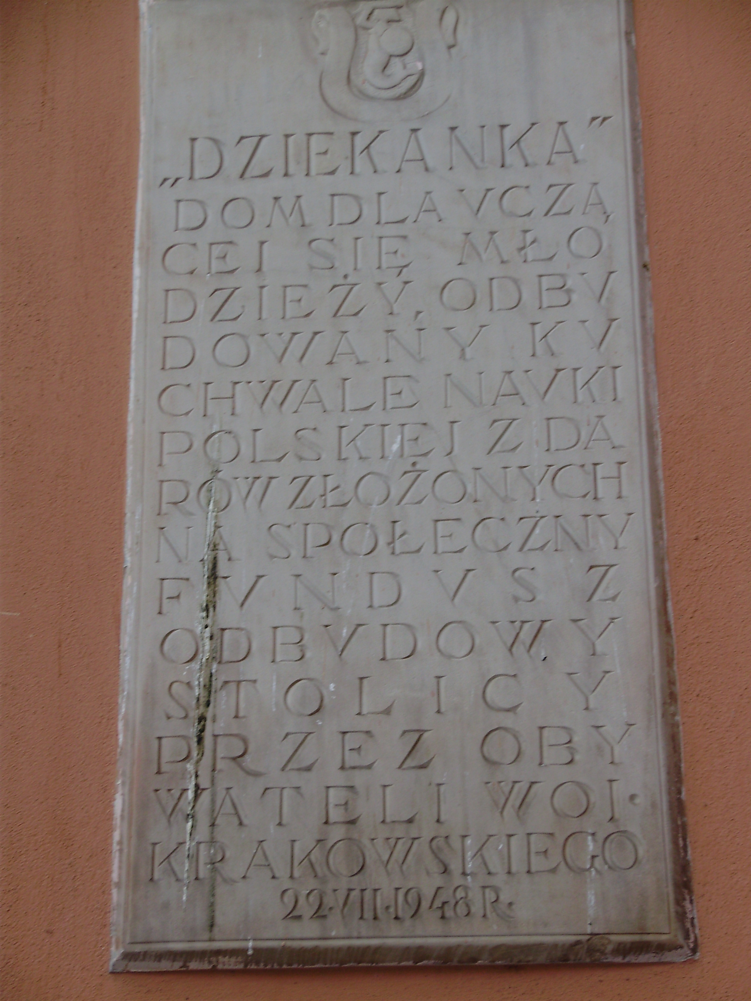 Tablica pamiątkowa poświęcona historii budynku.